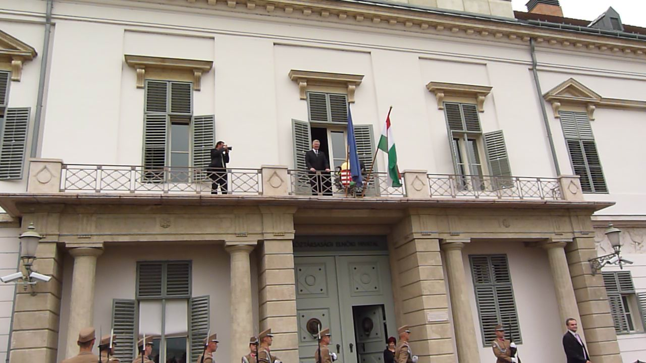 A felvétel 2011. április 25 -én készült. Schmitt Pál a Sándor Palota erkélyéről üdvözli az új alaptörvényt ünneplőket. Schmitt Pál köztársasági elnök a déli harangszó után írta alá a Sándor Palotában az Országgyűlés által egy héttel korábban elfogadott új alaptörvényt. A fénykép Creativ Commons alatt megjelent a Metapolisz DVD sorozatban.